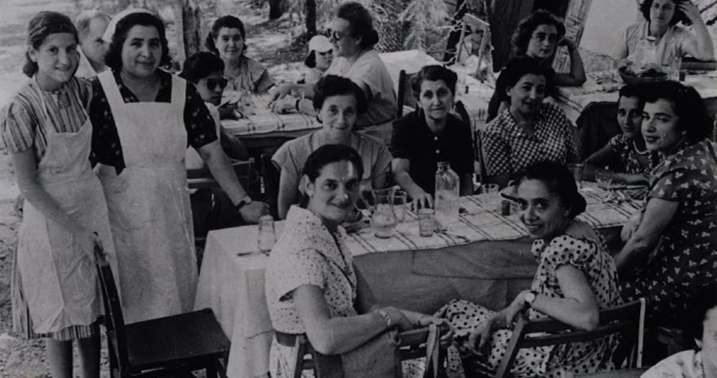 שושנה קליינר בפנסיון מרגוע יחד עם אורחיה